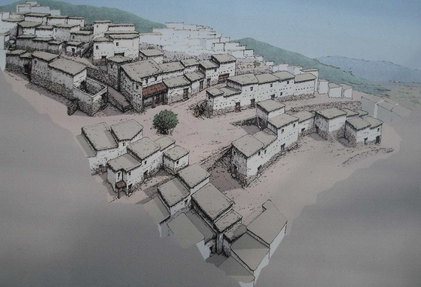 Reconstrucció de la ciutat ibera d'Edeta, segons el tauló informatiu a l'entrada del jaciment.